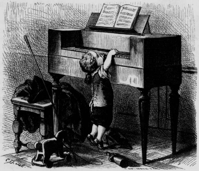 Der junge Mozart am Klavier